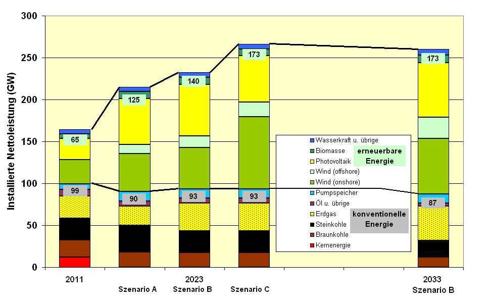 Kapazität der Kraftwerke zur Stromerzeugung in Deutschland 2011, 2023 und 2033, Grundlage für den Netzentwicklungsplan 2013